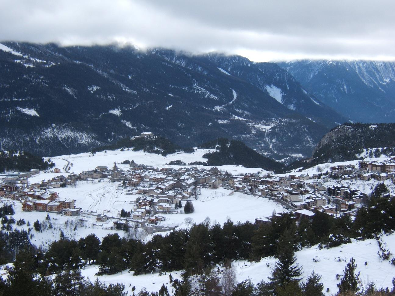 Le village d'Aussois, vue générale